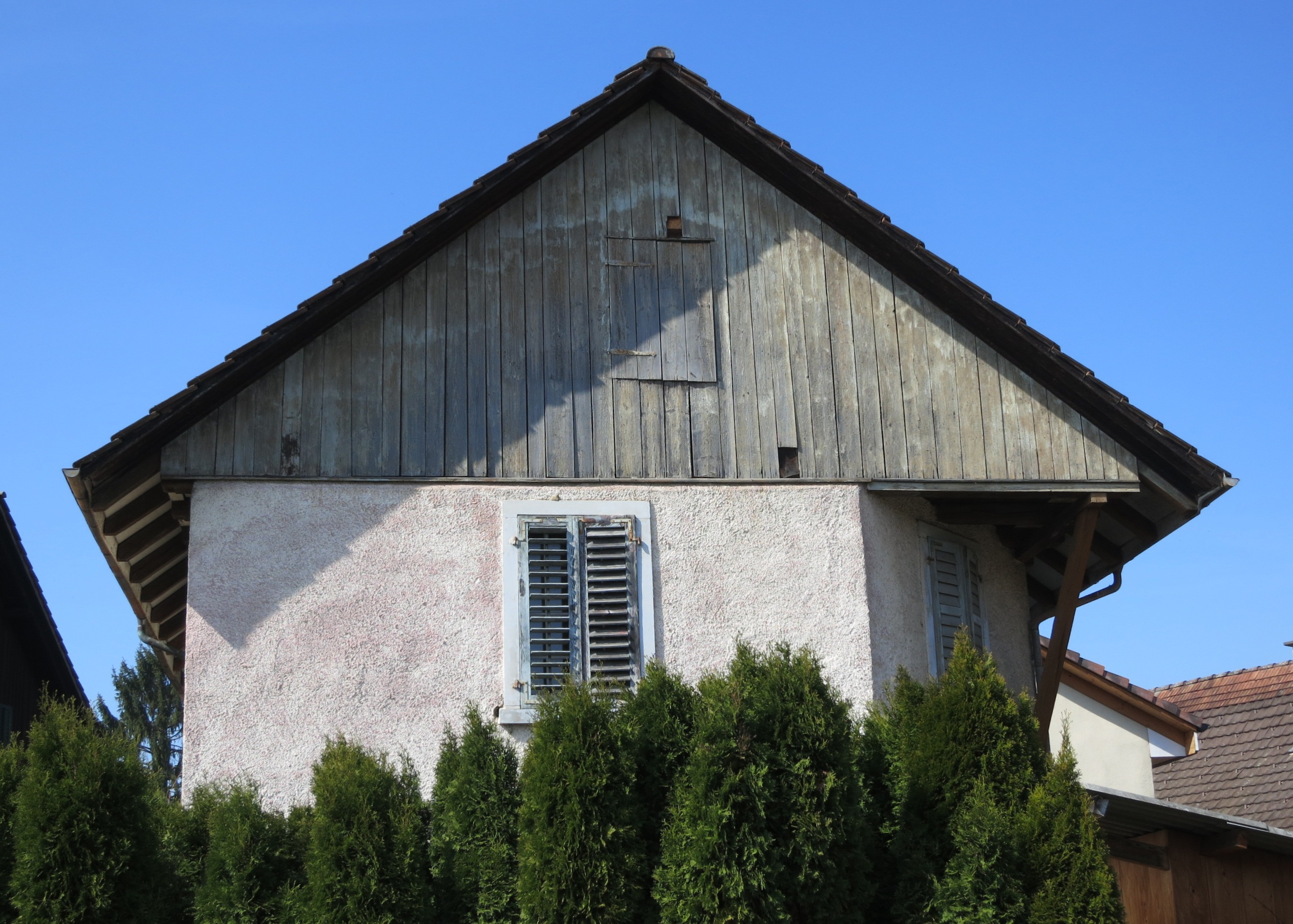 Wohnhaus, Jonen AG, Schweiz